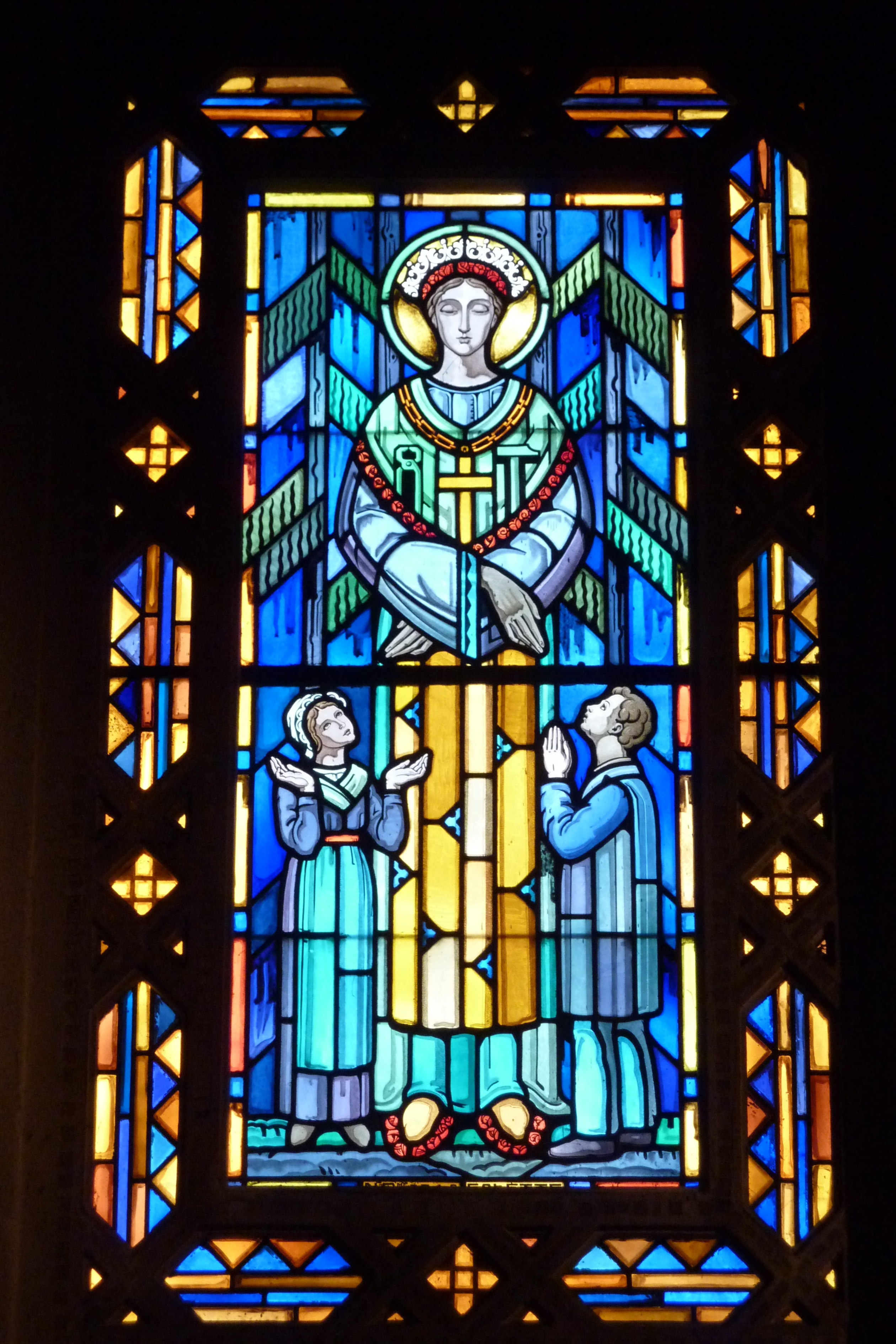 Bleiglasfenster in der Kirche (Langhaus, rechte Seite) Saint-Jean-Bosco in Paris (79, rue Alexandre-Dumas im 20. arrondissement), Darstellung: hl. Colette de Corbie